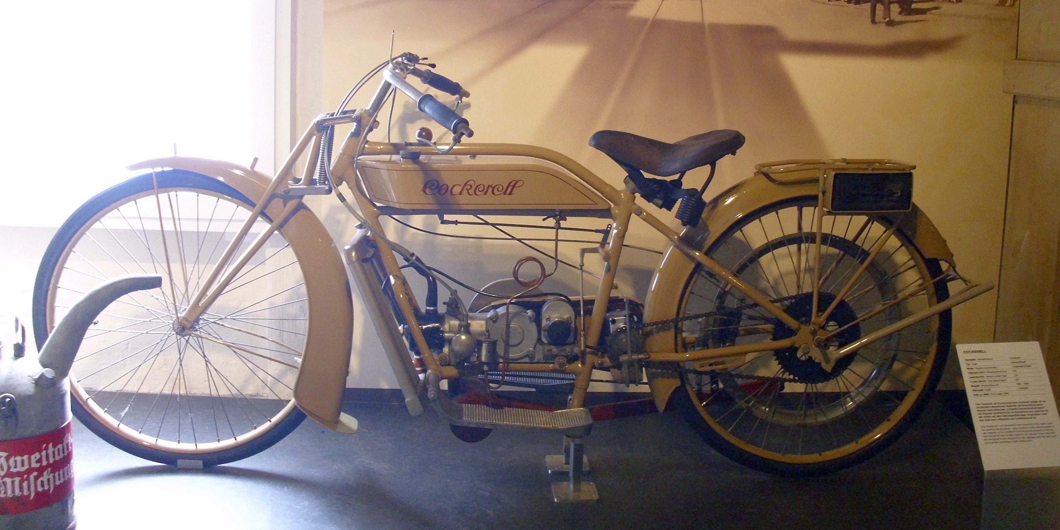 Cockerell Motorrad 1921-1925